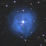 Planetary Nebula NGC 1514. Taurus constellation.